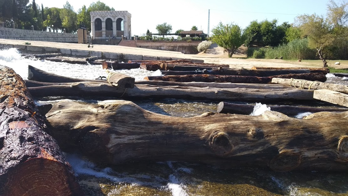 Al fondo, imagen de la actual Casa-castillo de las Compuertas en una imagen tomada tras la celebración de la fiesta de la Maerà, cuyos troncos transportados por el río aparecen en primer término.